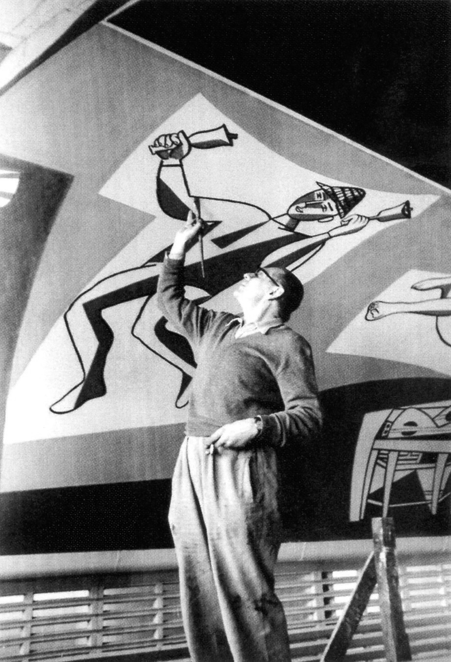 Luís Seoane pintando el mural Los músicos en la Galería Santa Fe de Buenos Aires 1953